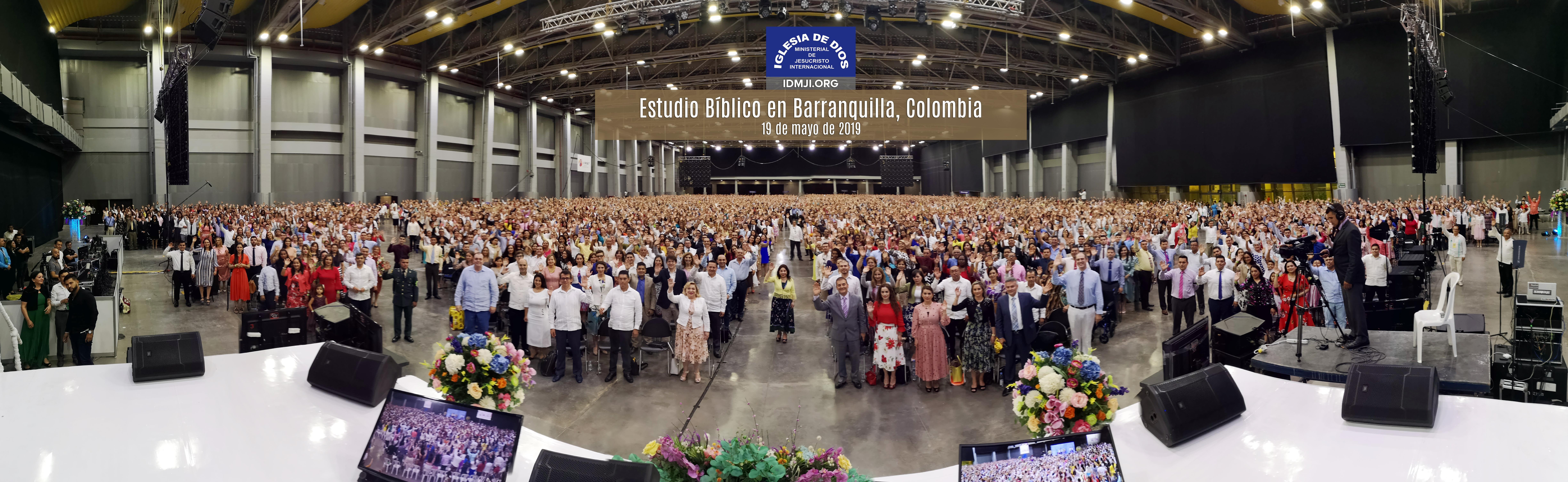 Panorámica Iglesia de Dios Ministerial de Jesucristo Internacional - Servicio de culto